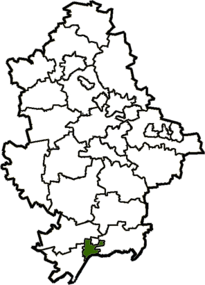 Mariupol-Raion map